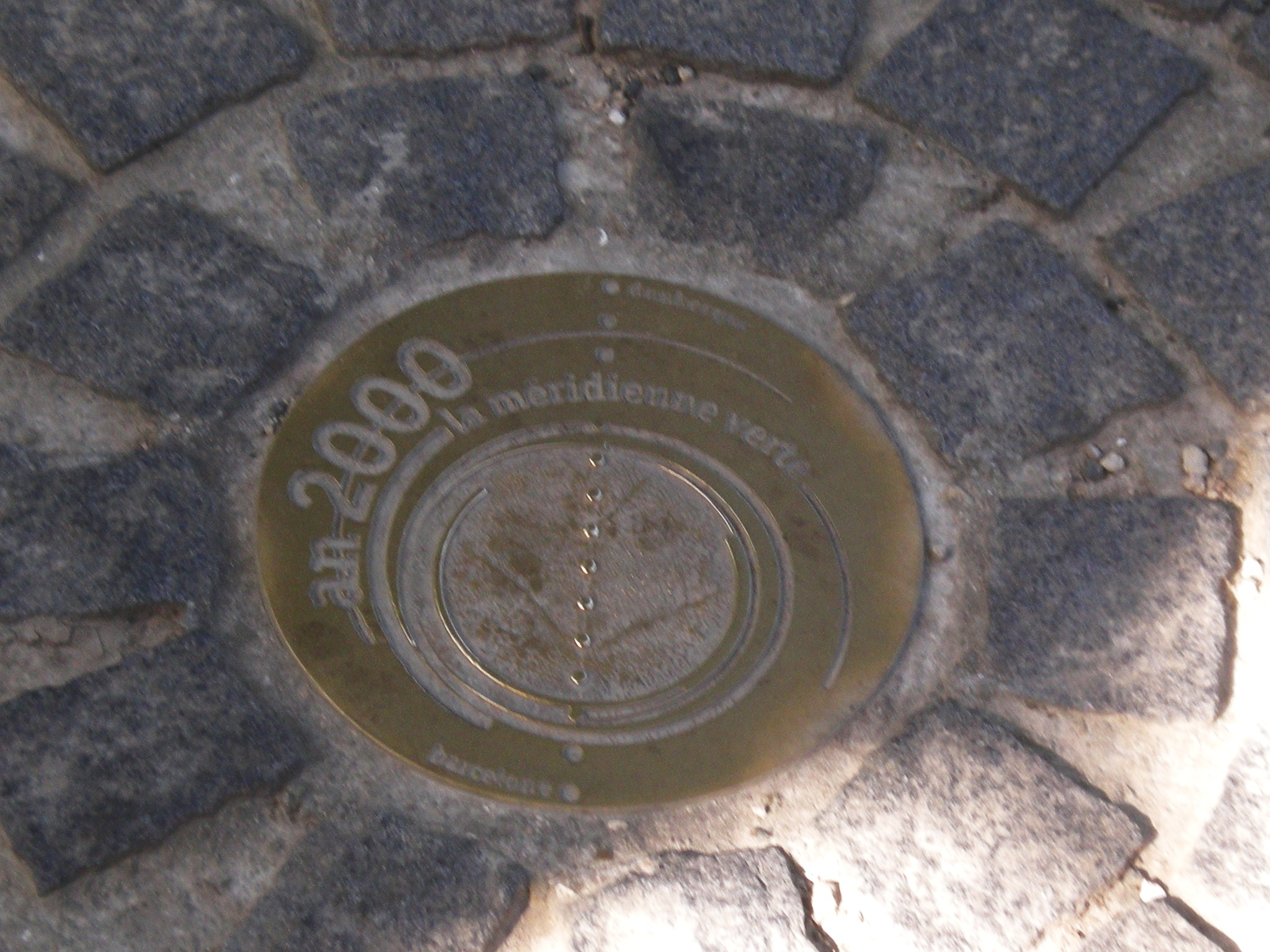 Marque du passage de la méridienne verte ou méridien de Paris sur la route forestière de Condé (Forêt de Hez-Froidmont, commune de la Neuville-en-Hez).